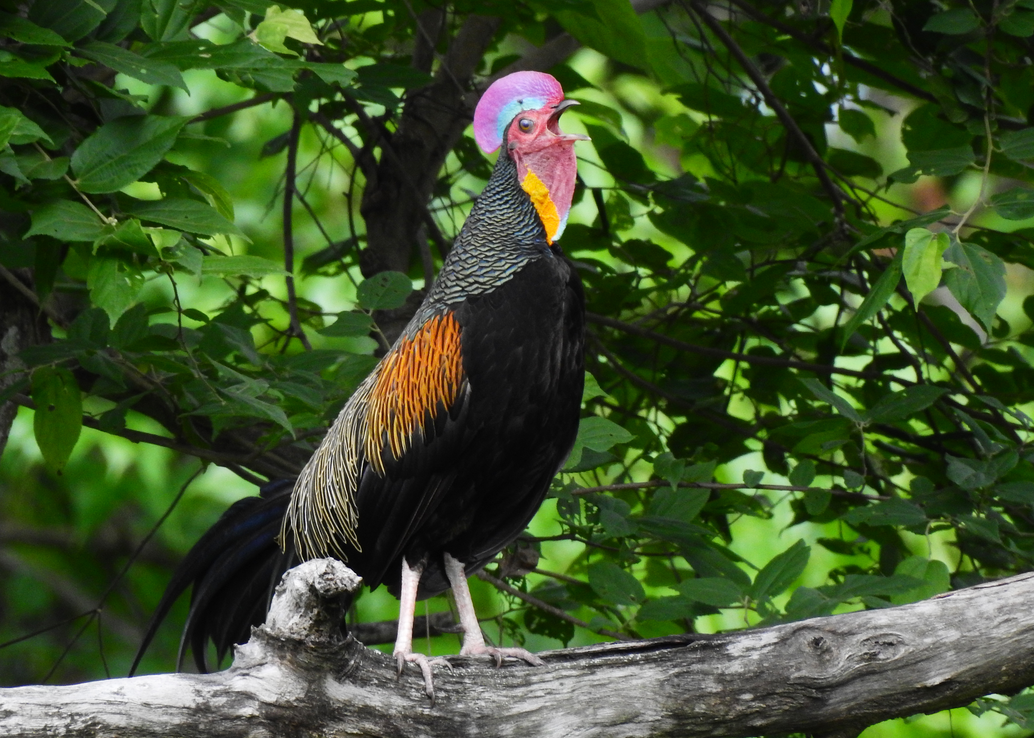 Ayam-hutan hijau (Gallus varius) merupakan spesies burung terestrial endemik Jawa, Bali dan Nusa Tenggara. Seperti ayam pada umumnya, burung ini sering berkokok di pagi hari dengan suara nyanyian yang pendek, nyaring dan jelas. Suaranya yang indah ini membuatnya sering diburu untuk dikawinkan dengan ayam domestik untuk menghasilkan ayam bekisar.